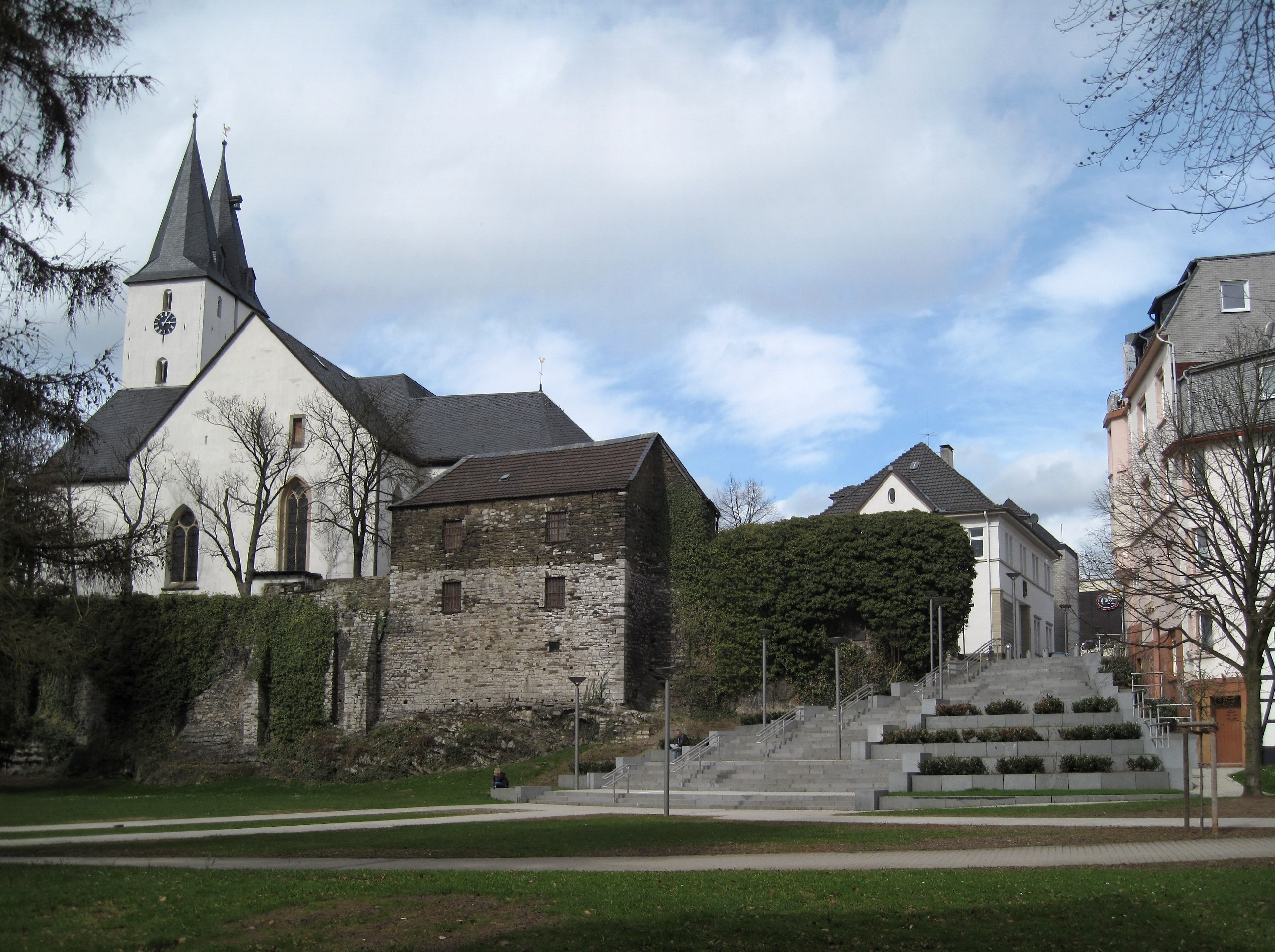 Oberste Stadtkirche, Stadtmauerreste mit in die Stadtmauer gebautem ehemaligem Burgmannshaus und dem Treppenaufgang zum Am Bilstein in Iserlohn.